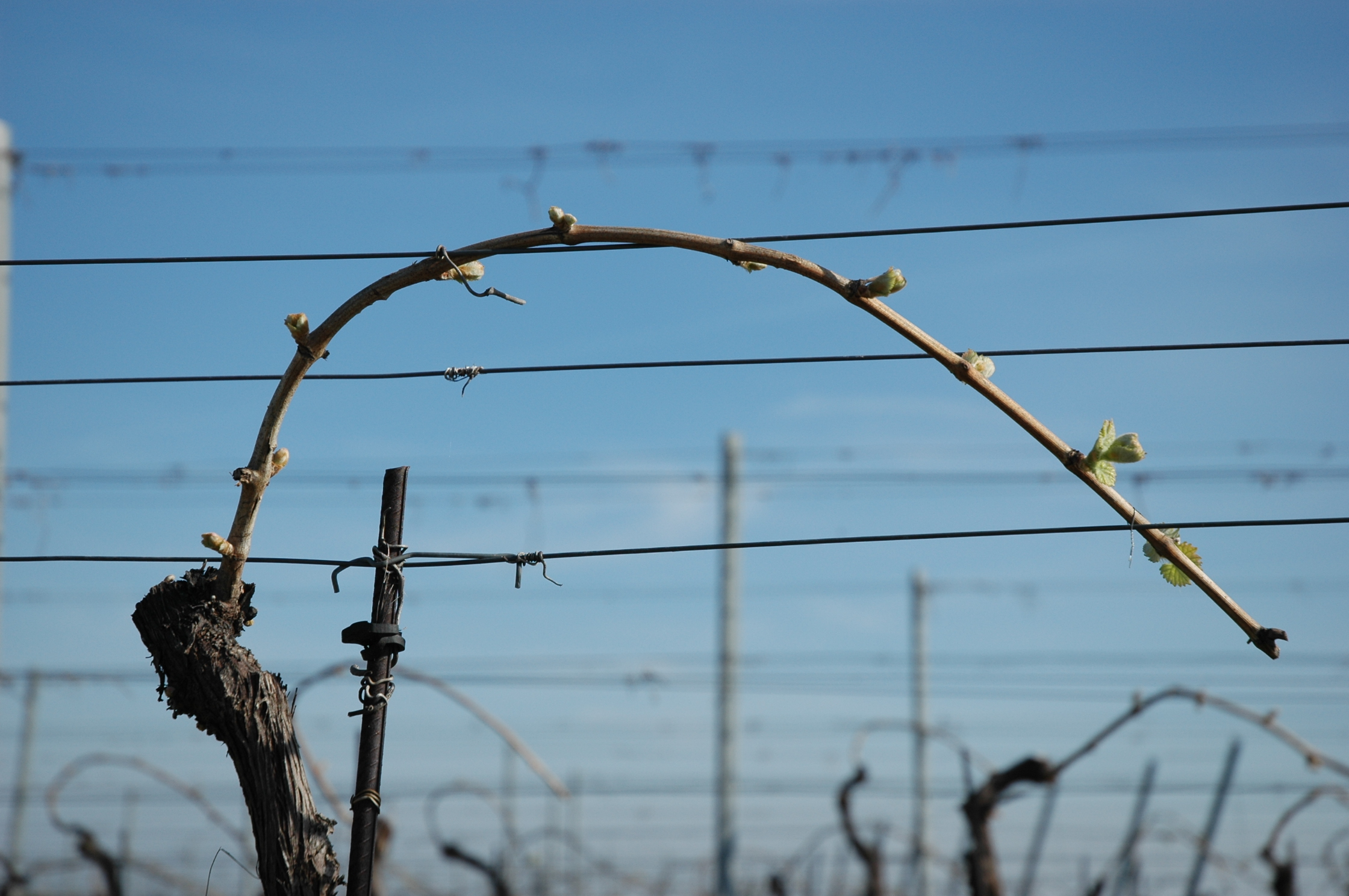 Halbbogenschnitt